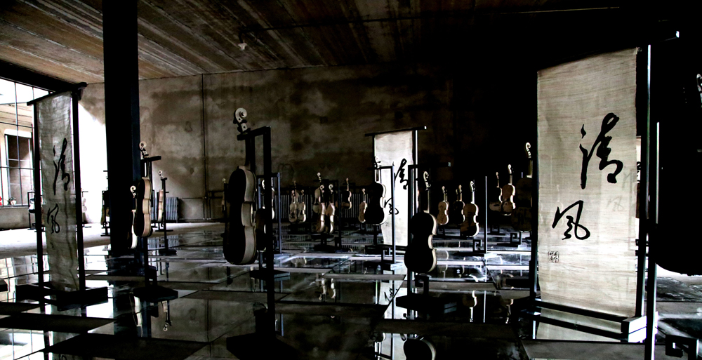 Installation